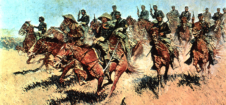 Oil painting